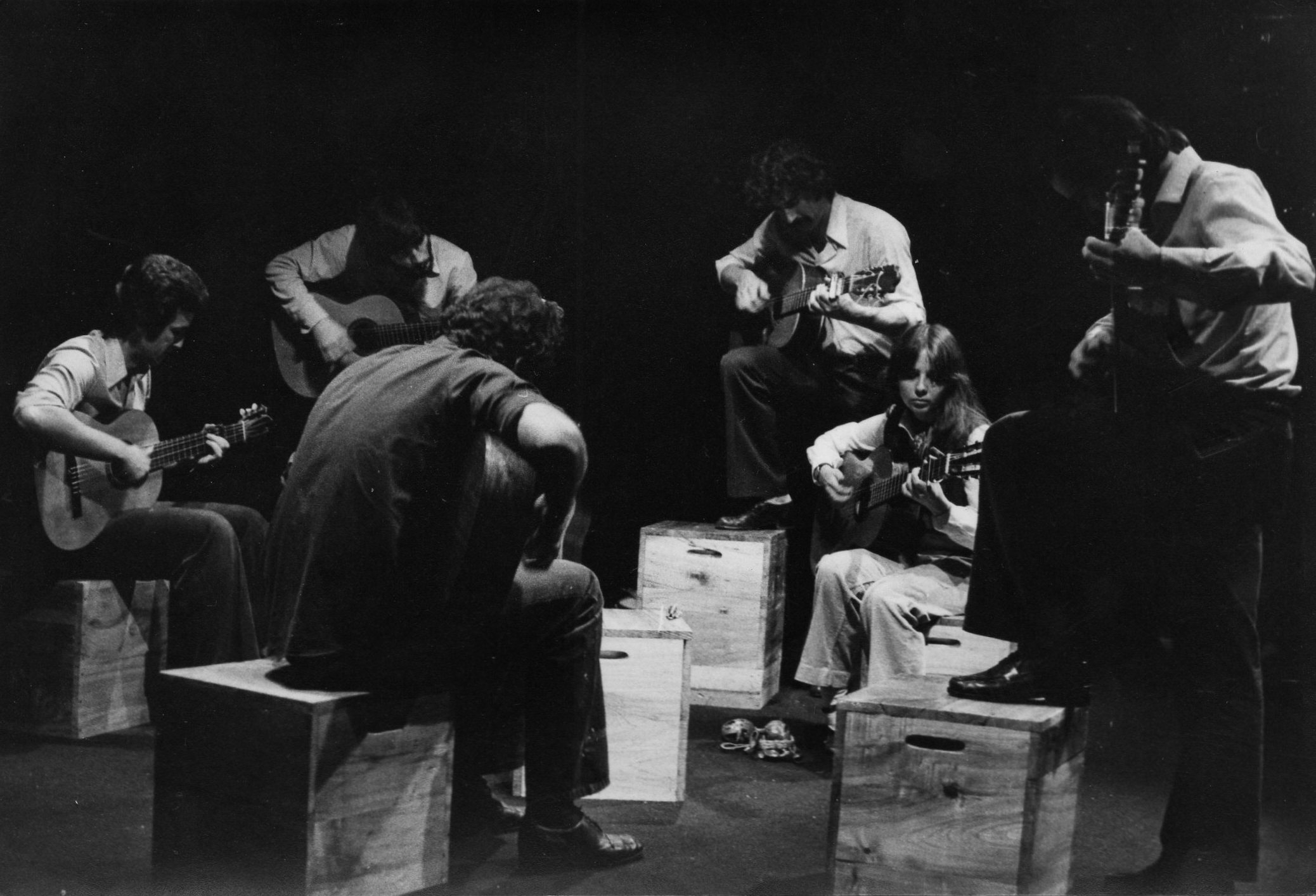 Fotografía del grupo uruguayo de música popular "Rumbo" (1979 - 1987)